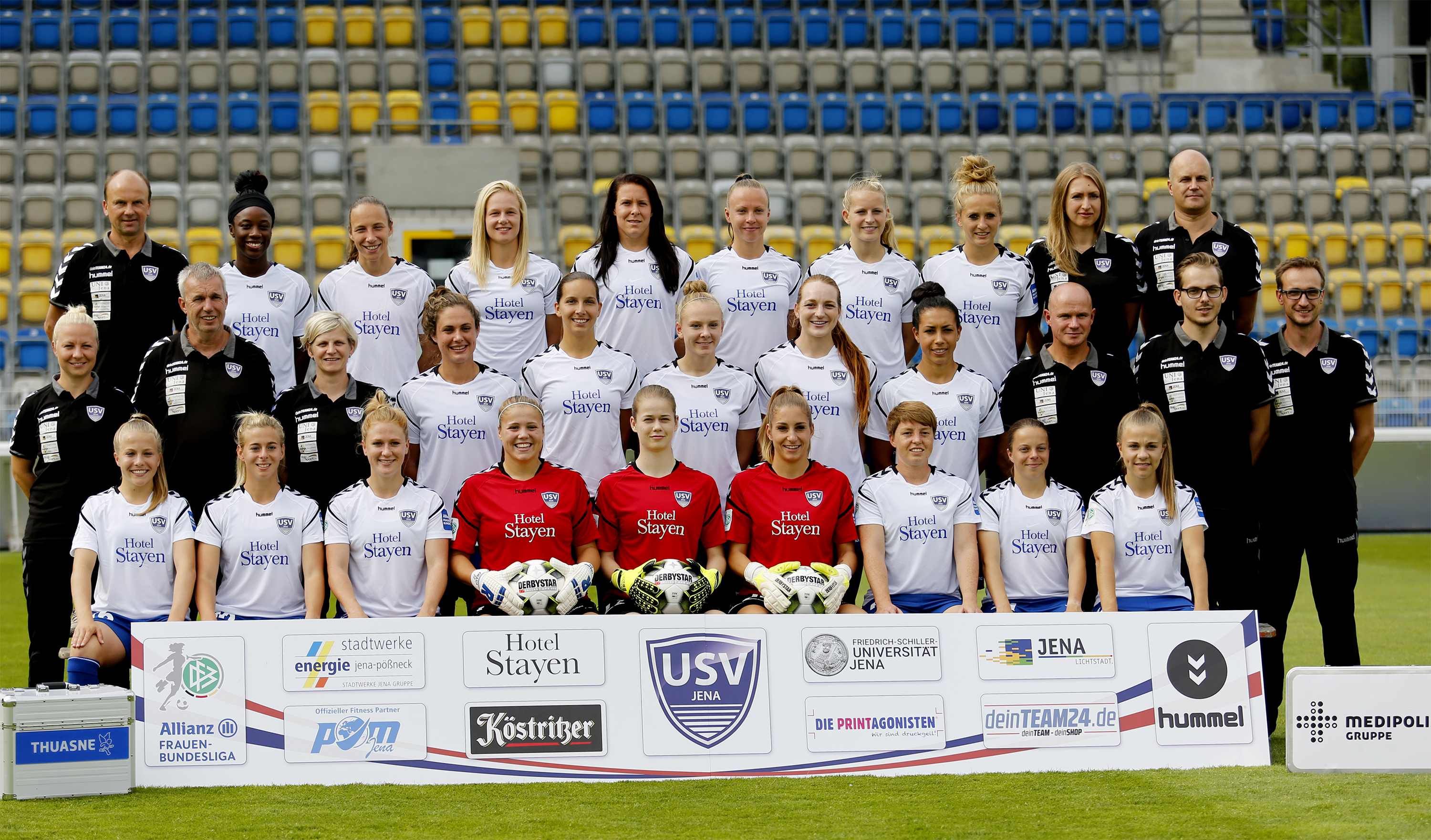 FF USV Jena (Mannschaft 1. BL 2017/18)